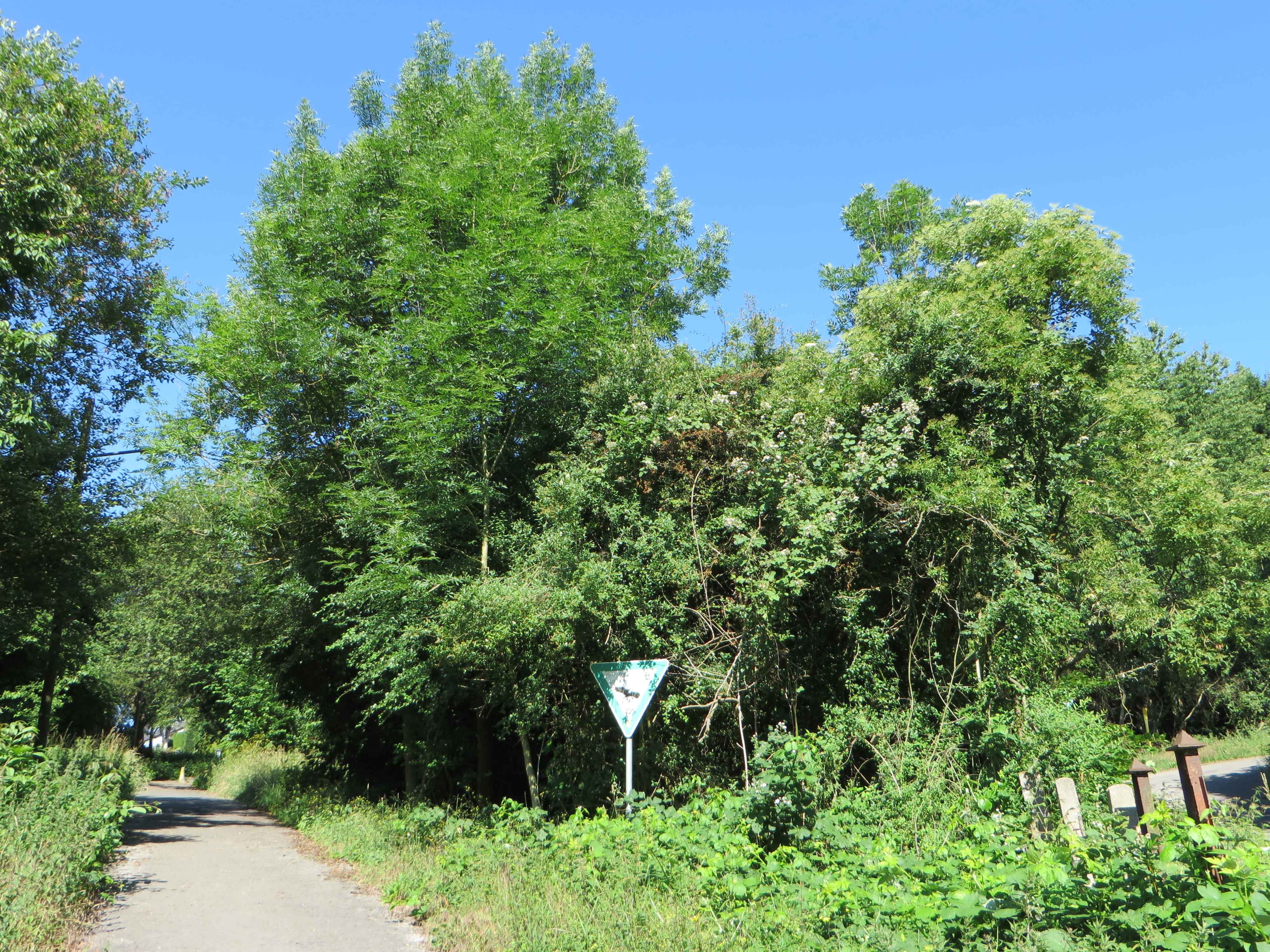 Geschützter Landschaftsbestandteil 1.4.2.53 „Distelstück“ in Hagen, südwestlich der Siedlung Baukloh. Es handelt sich um den verbliebenen Abschnitt eines vom Distelbach durchflossenen Siepen mit artenreichem Gehölzbestand.